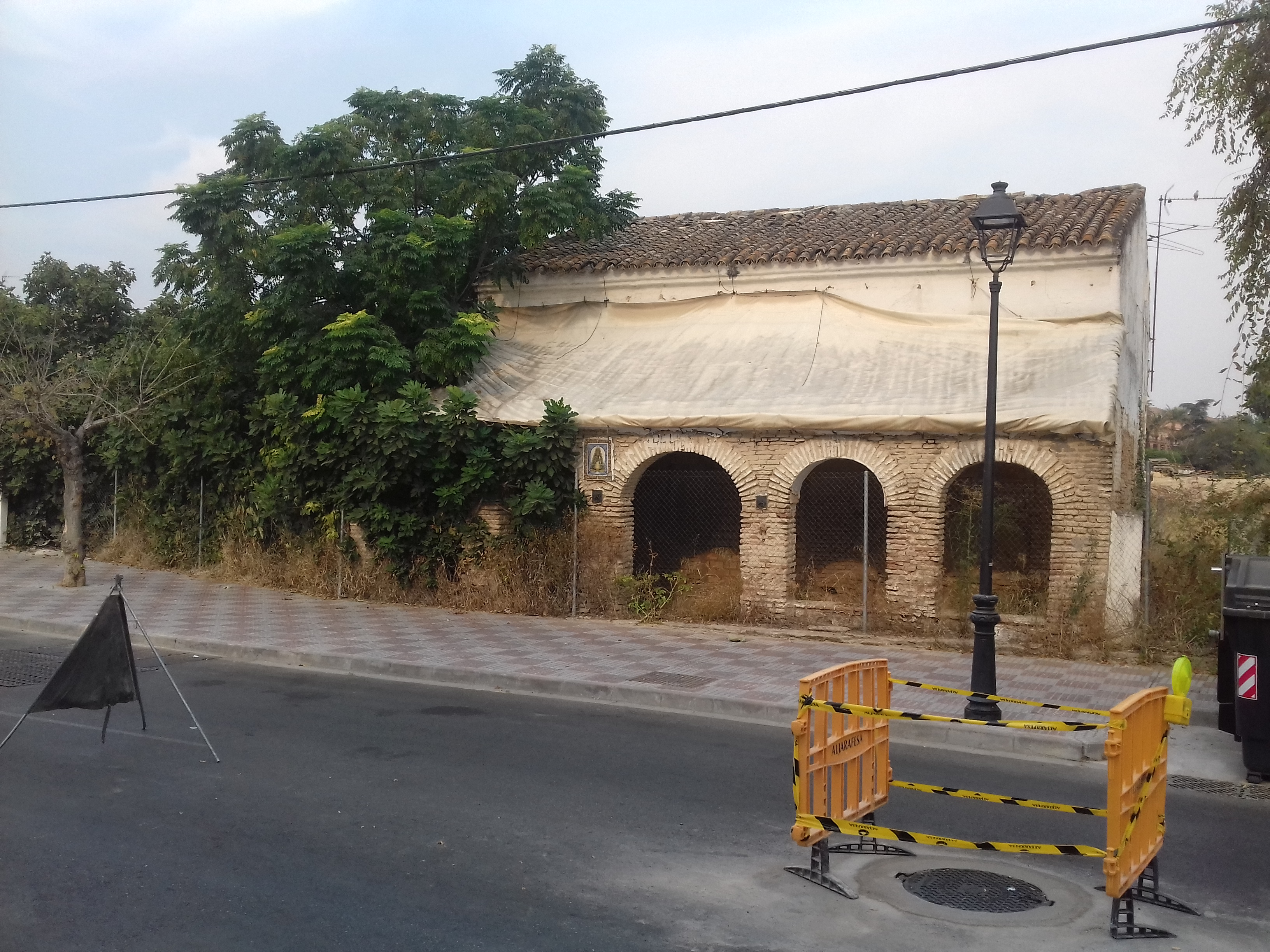 Estado actual de la Venta de la Mascareta